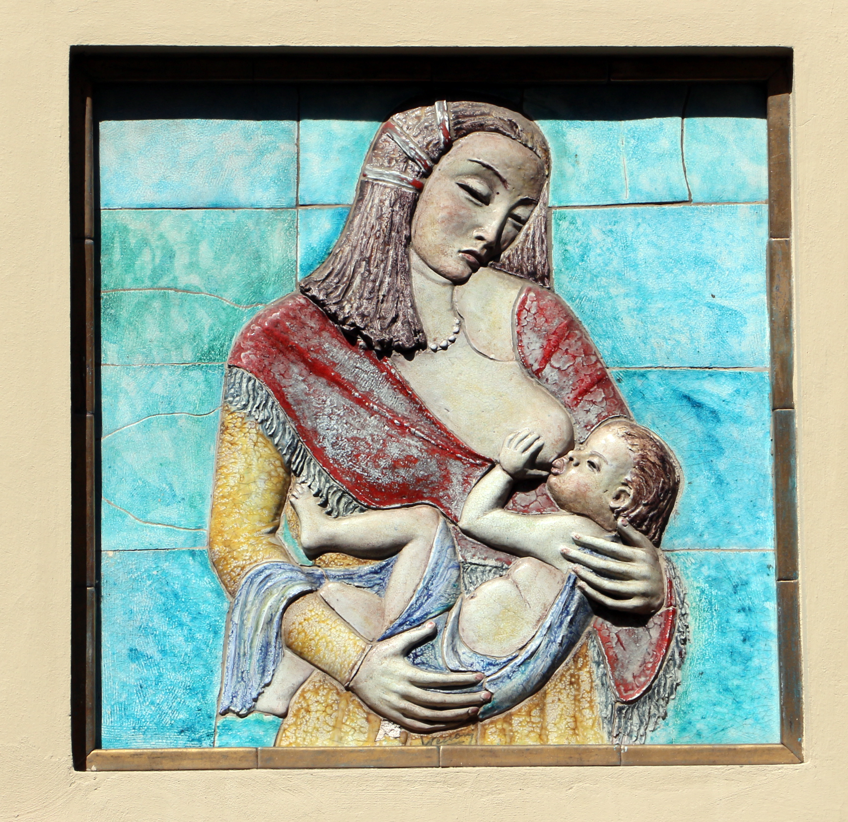 Bernardino poccetti, nozze di cana, 1604, 01.JPG A quest'ora non posso correggere e me ne scuso, ma...l'errore è chiaro.